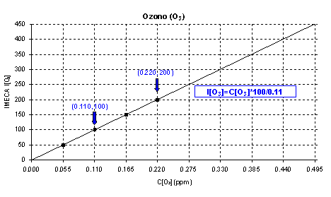 Ejemplo de como se obtiene el algoritmo para calcular el IMECA